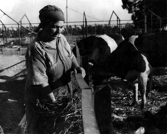 מרים ברץ הייתה מראשוני דגניה א' ומייסדת הרפת בקיבוץ מרים ברץ ברפת